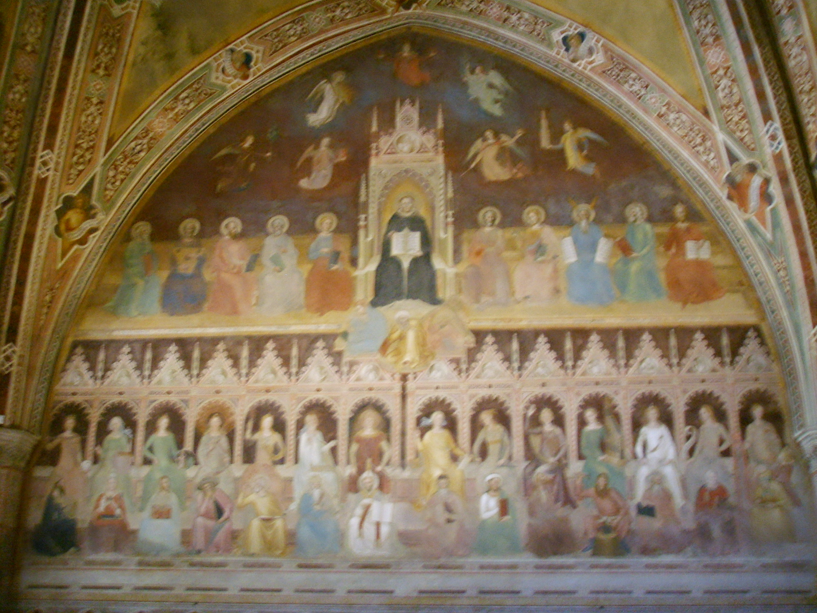 Santa Maria Novella church, Cappellone degli Spagnoli (Big Chapel of Spanish), fresco by Andrea di Bonaiuto, in Florence, Italy